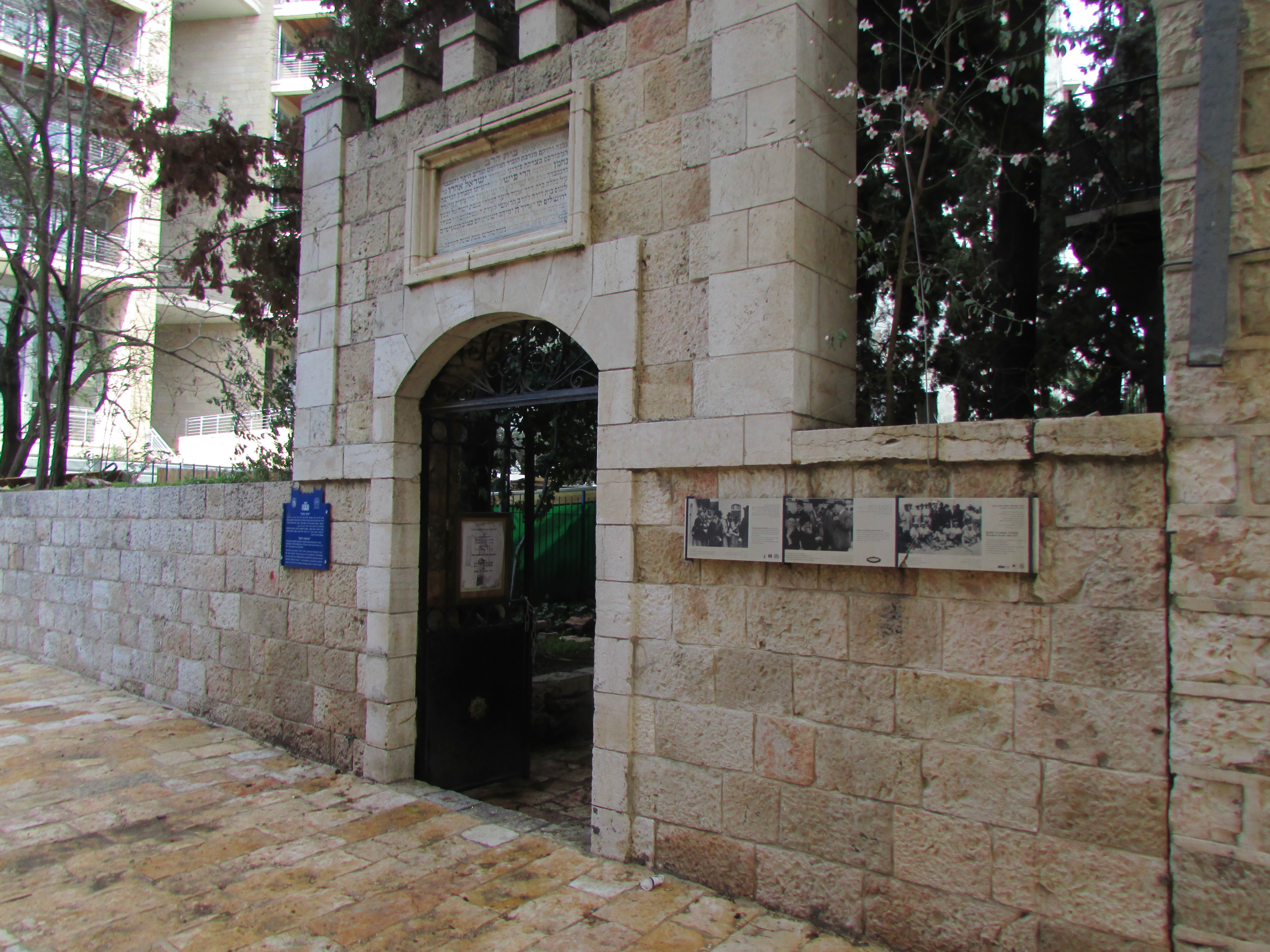 Rabbi Kook house